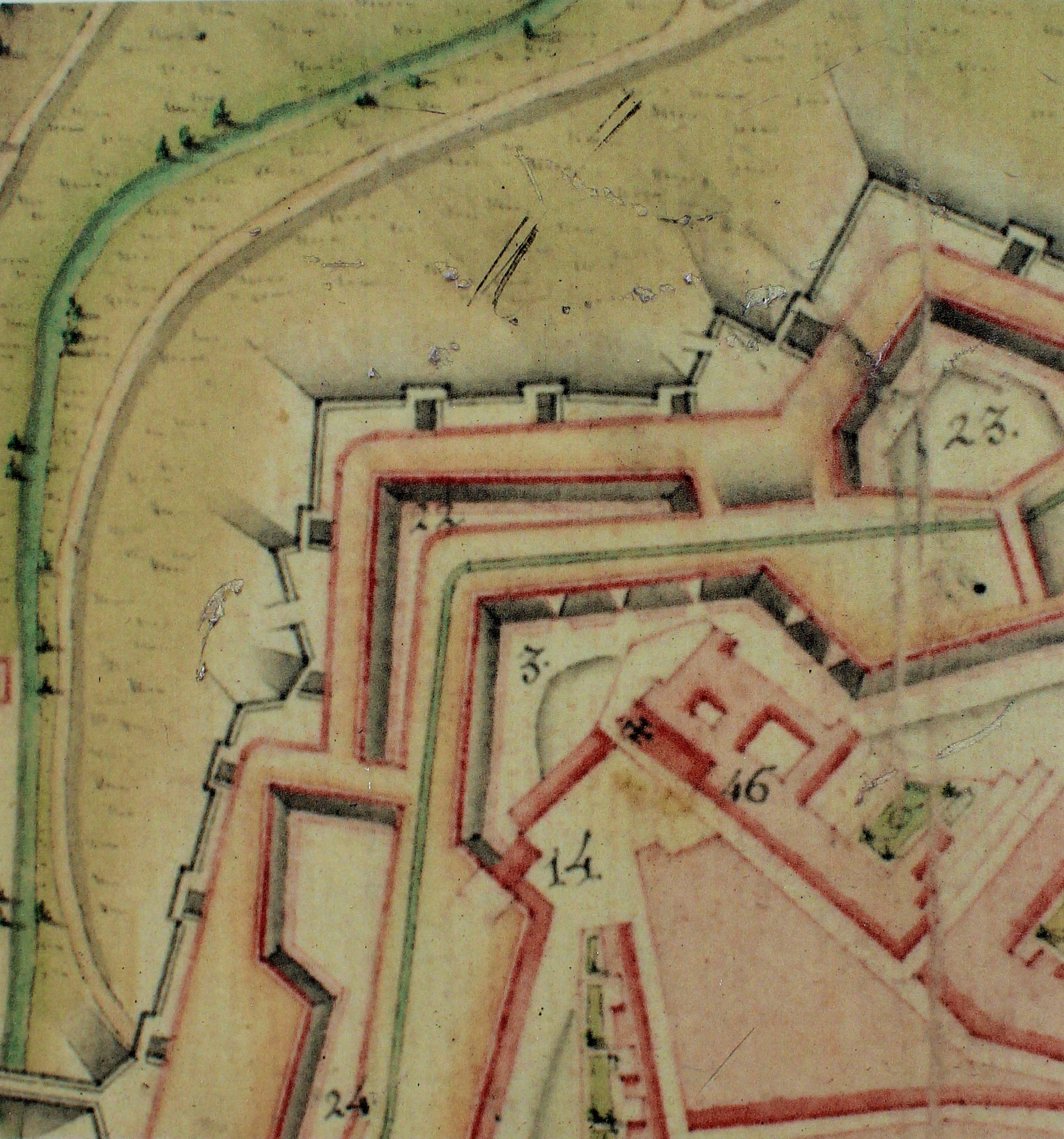 Plano de detalle del baluarte.